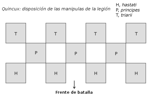 formación quincunx, para la traducción de legiones romanas Es modificación del original en la wikipedia en ingles